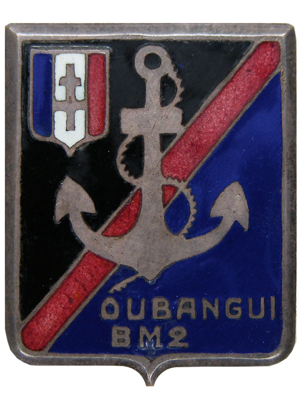 Insigne du Bataillon de Marche n°2 de l'Oubangui-Chari (Afrique équatoriale française), métal blanc et émail, 26,5 x 33 mm, seconde guerre mondiale.